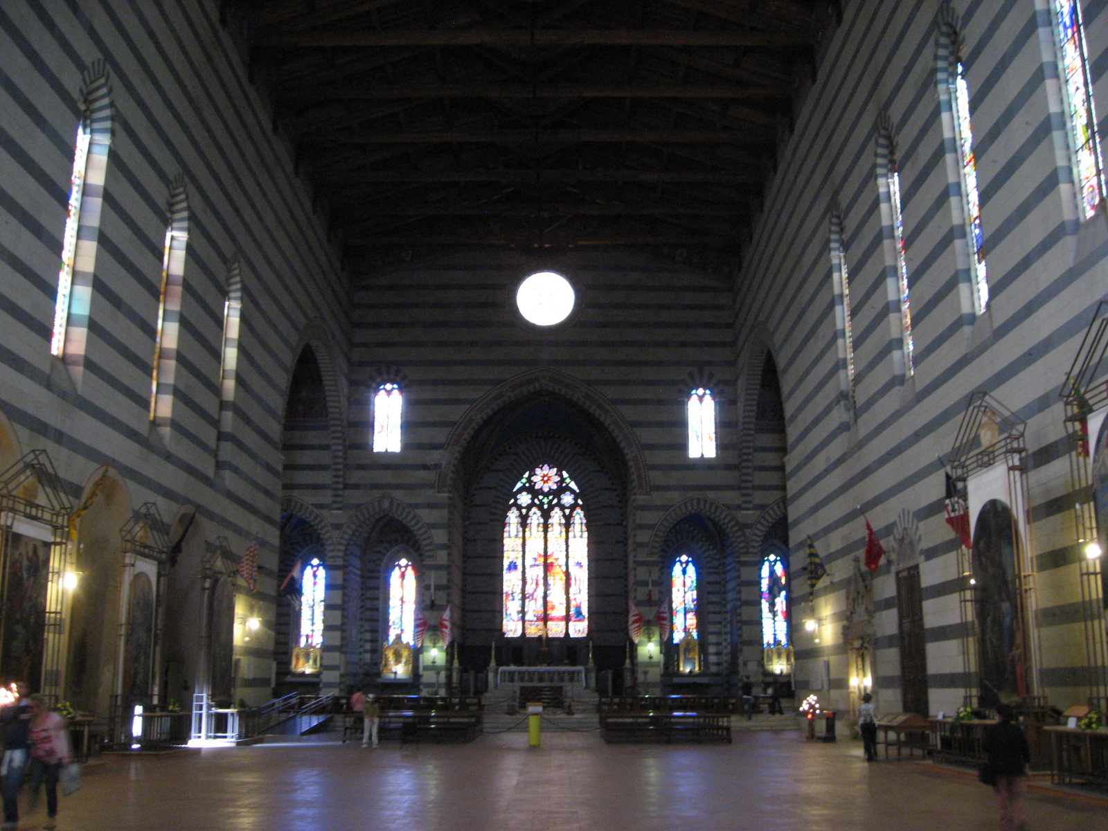 Basilica of San Francesco in Siena